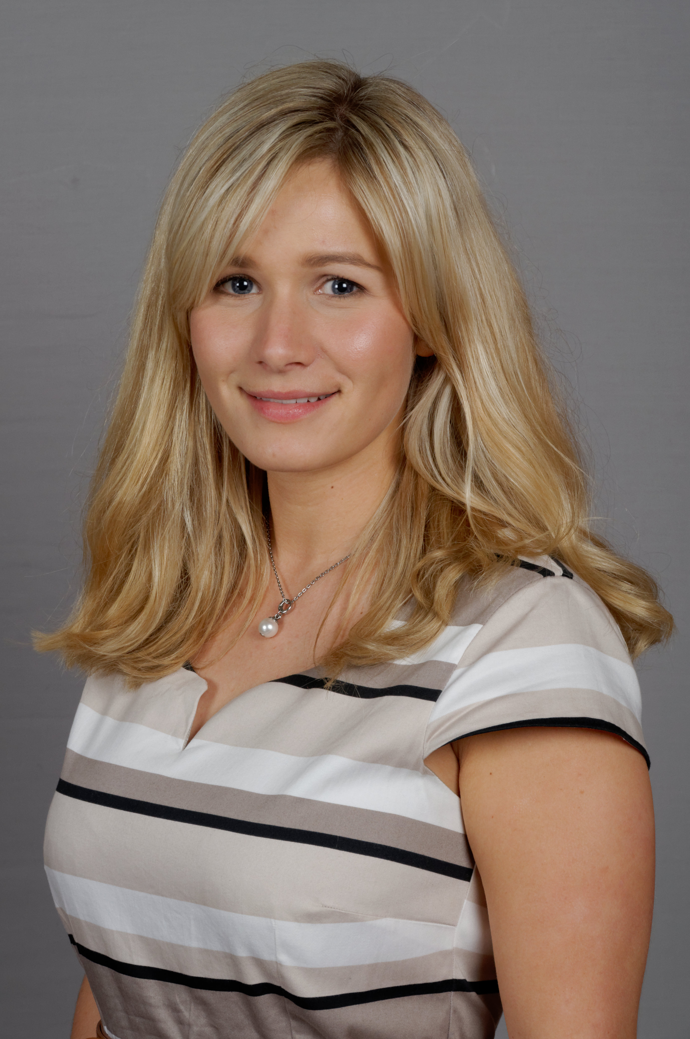 Nadine Julitz, MdL Mecklenburg-Vorpommern